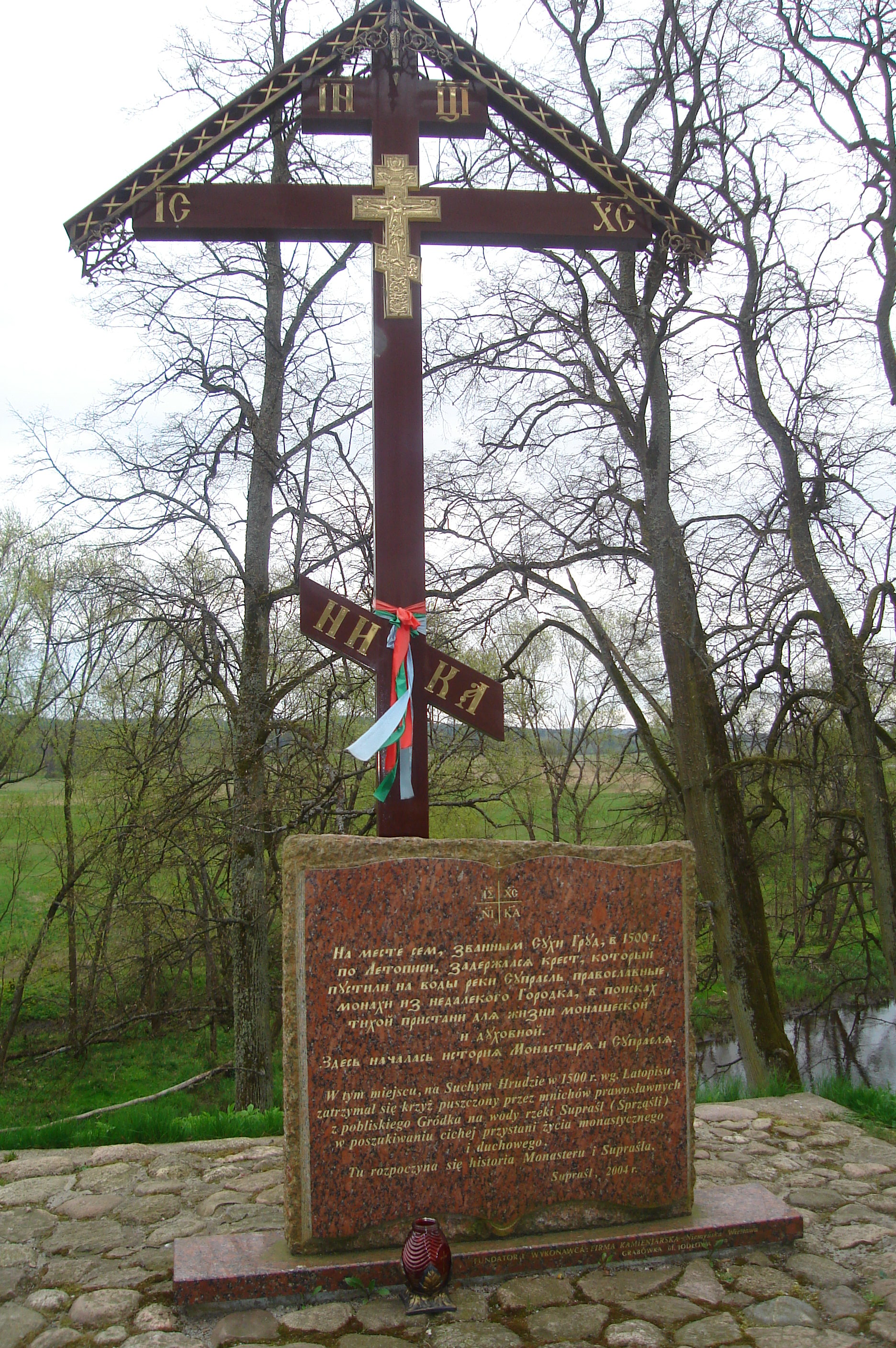 Krzyż i tablica pamiętkowa przy klasztorze prawosławnym w Supraślu